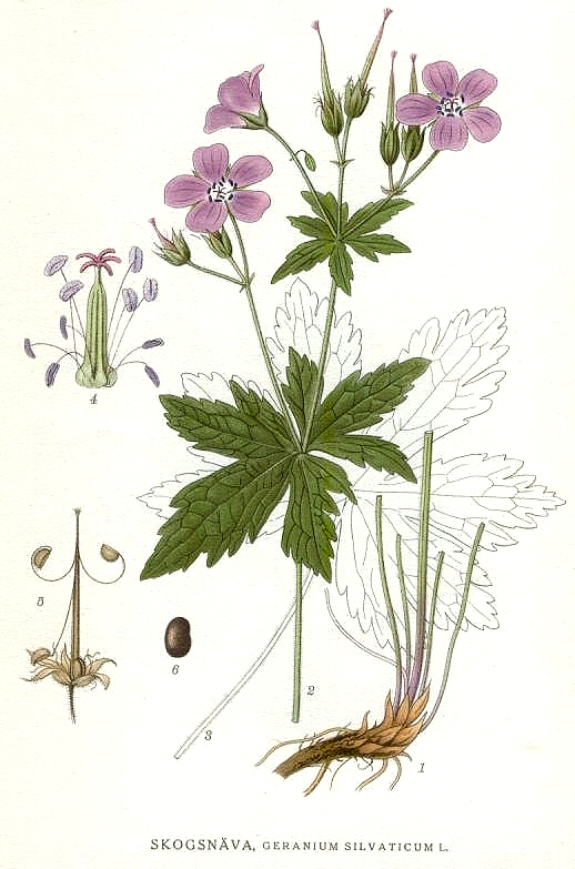 Original Description Skogsnäva, Geranium sylvaticum L.